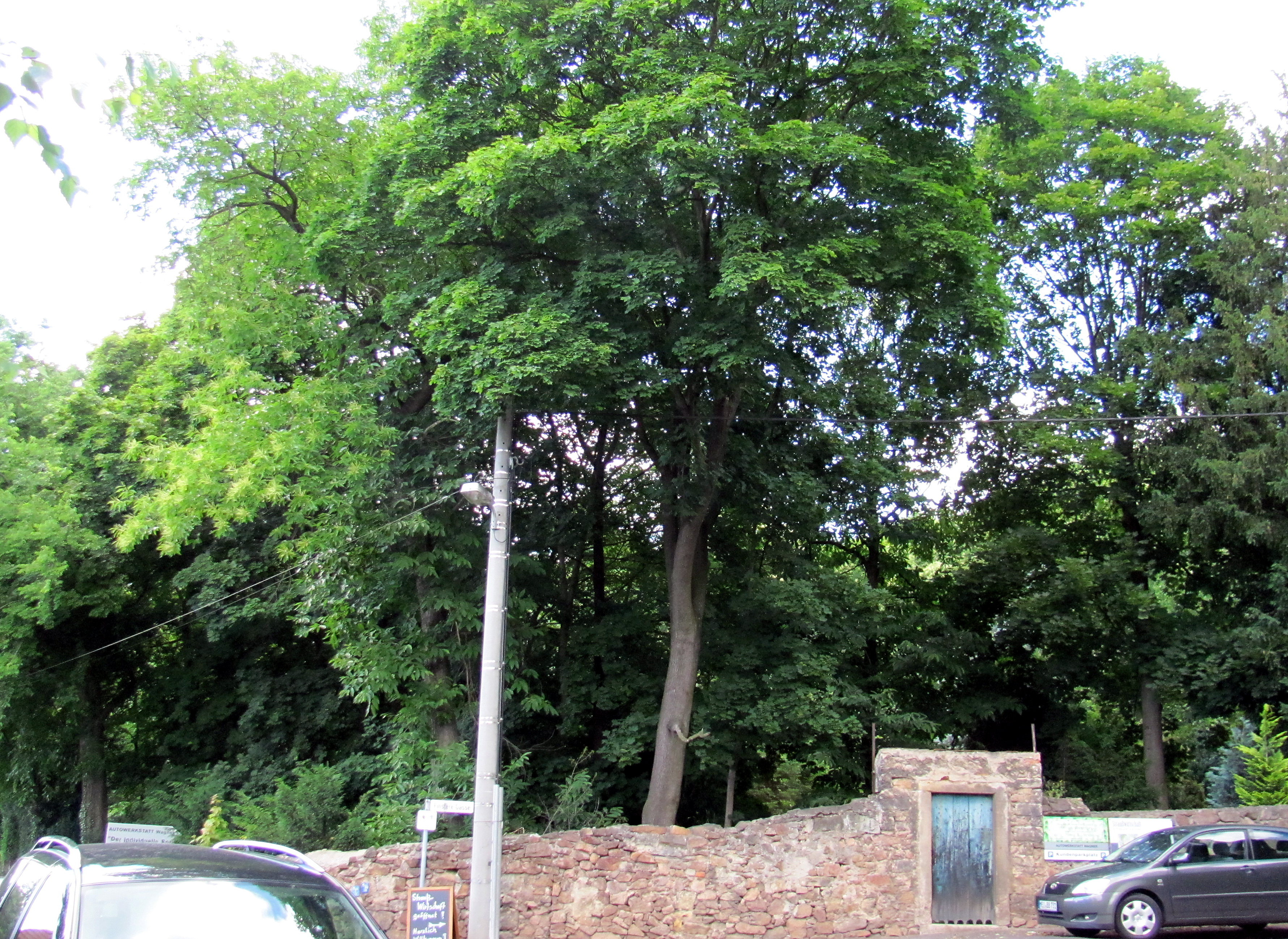 Radebeul-Niederlößnitz, Minckwitzscher Weinberg, Park als Werk der Landschafts- und Gartengestaltung geschützt, am Fuß der Steillage, von Osten aus